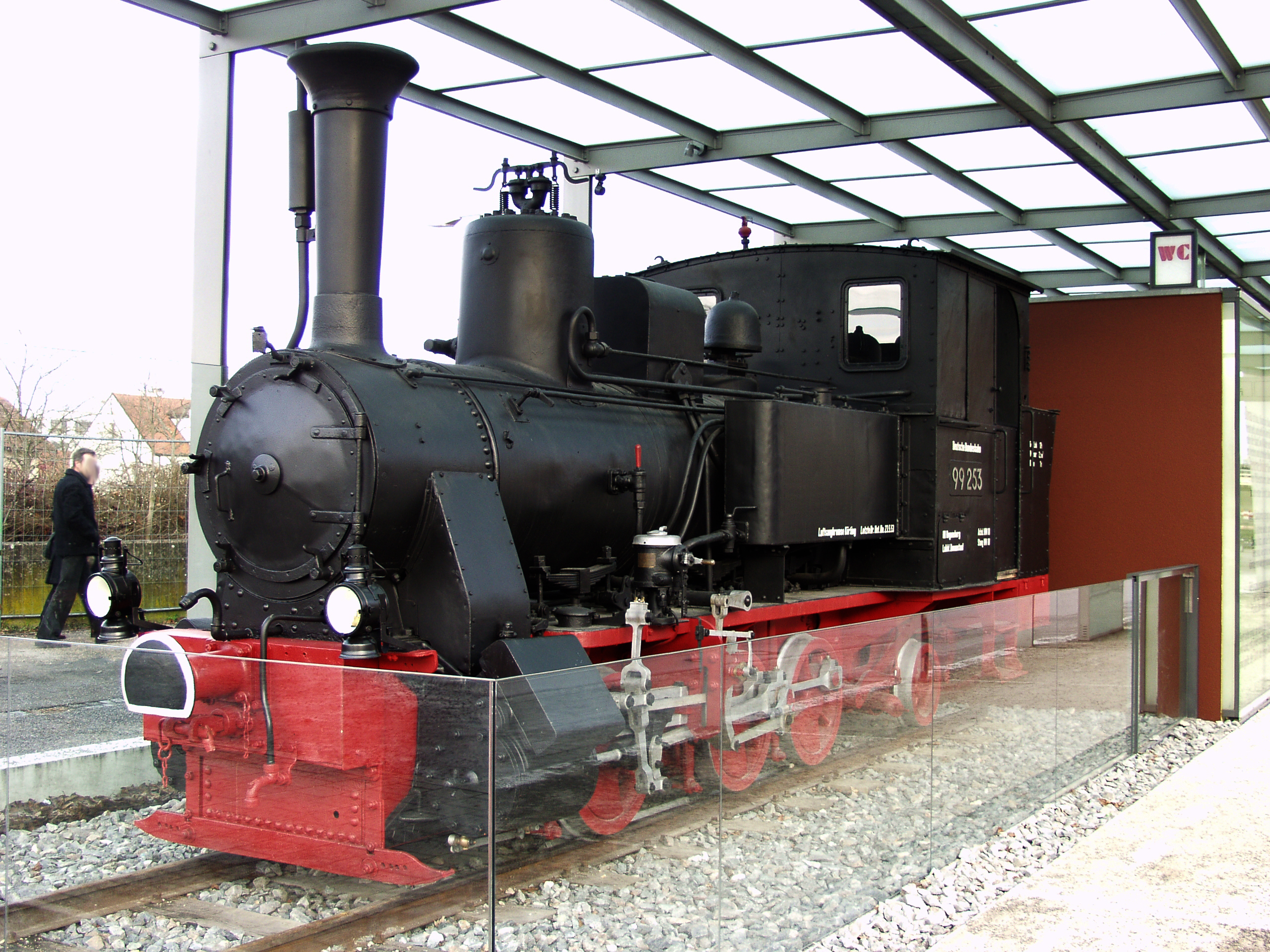 99 253 der Walhallabahn als Denkmal in Regensburg-StadtamhofObject location49° 01′ 35.04″ N, 12° 05′ 48.11″ E